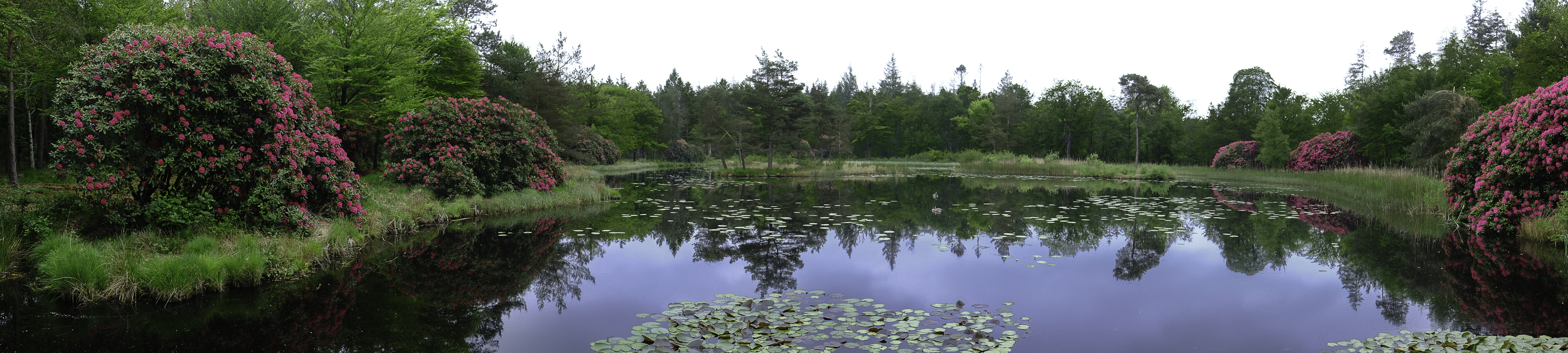 Panorama over de Freulevijver in 't Oude Bosch bij Bakkeveen